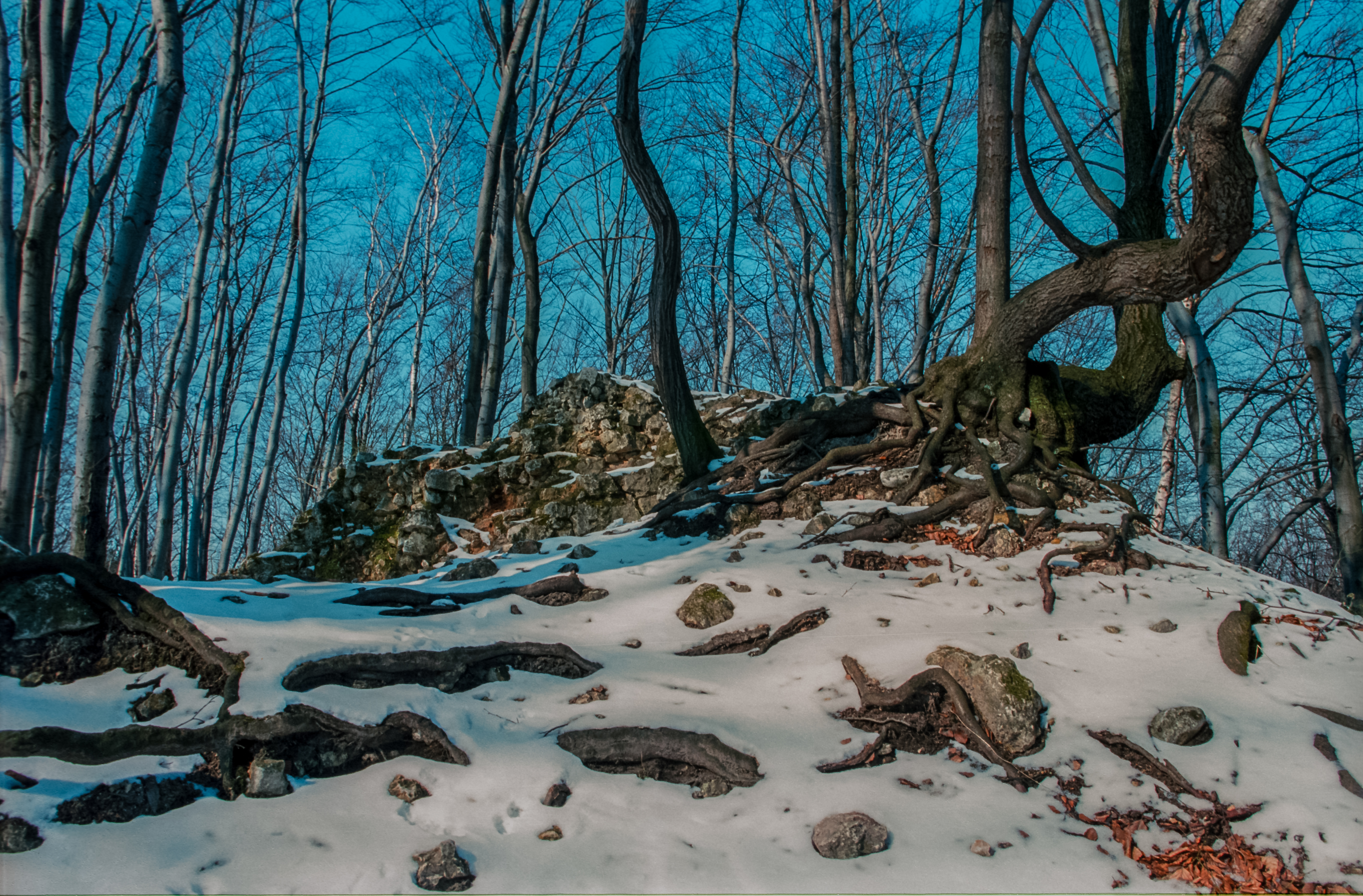 Poland, Jura, Ostreznik Castle